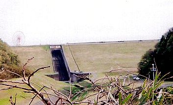 Dam